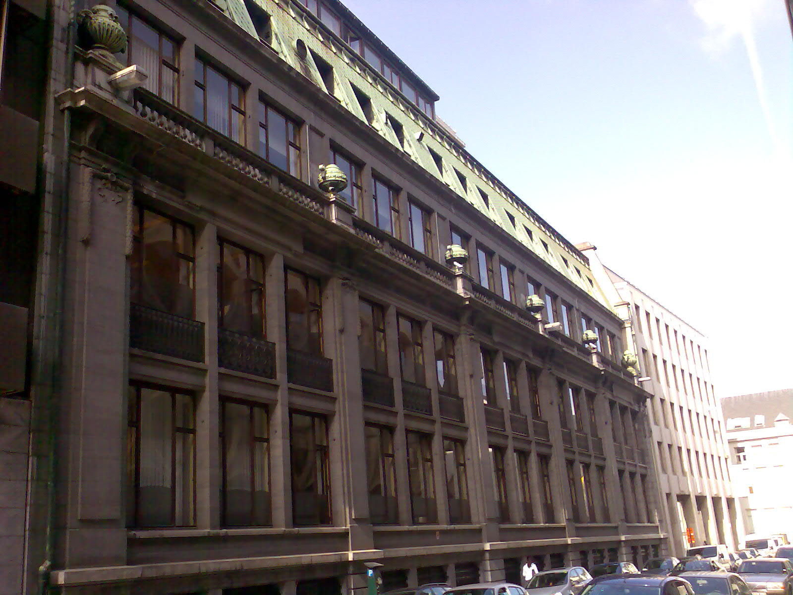 Caisse d'Épargne à Bruxelles, aile rue des Boîteux par l'architecte Alfred Chambon (1930), à l'origine attenante à l'aile de Henri van Dievoet (1901) détruite dans les années 1980.